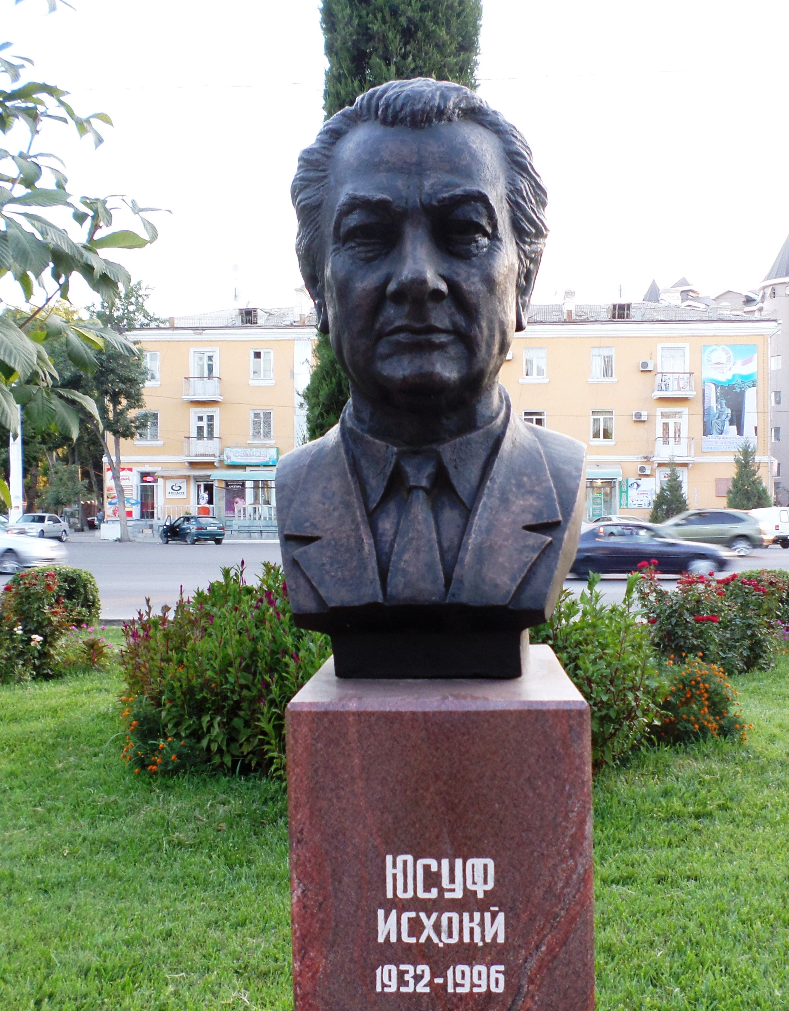 Юсуф Исхоки - учёный, медик, государственный деятель Таджикской ССР